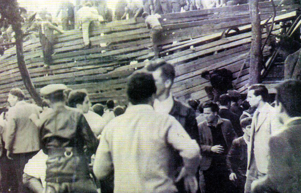 Imagen del derrumbe de una de las tribunas del estadio de Gimnasia durante el accidentado clásico platense de 1959